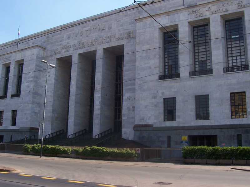 Milano - Palazzo di Giustizia